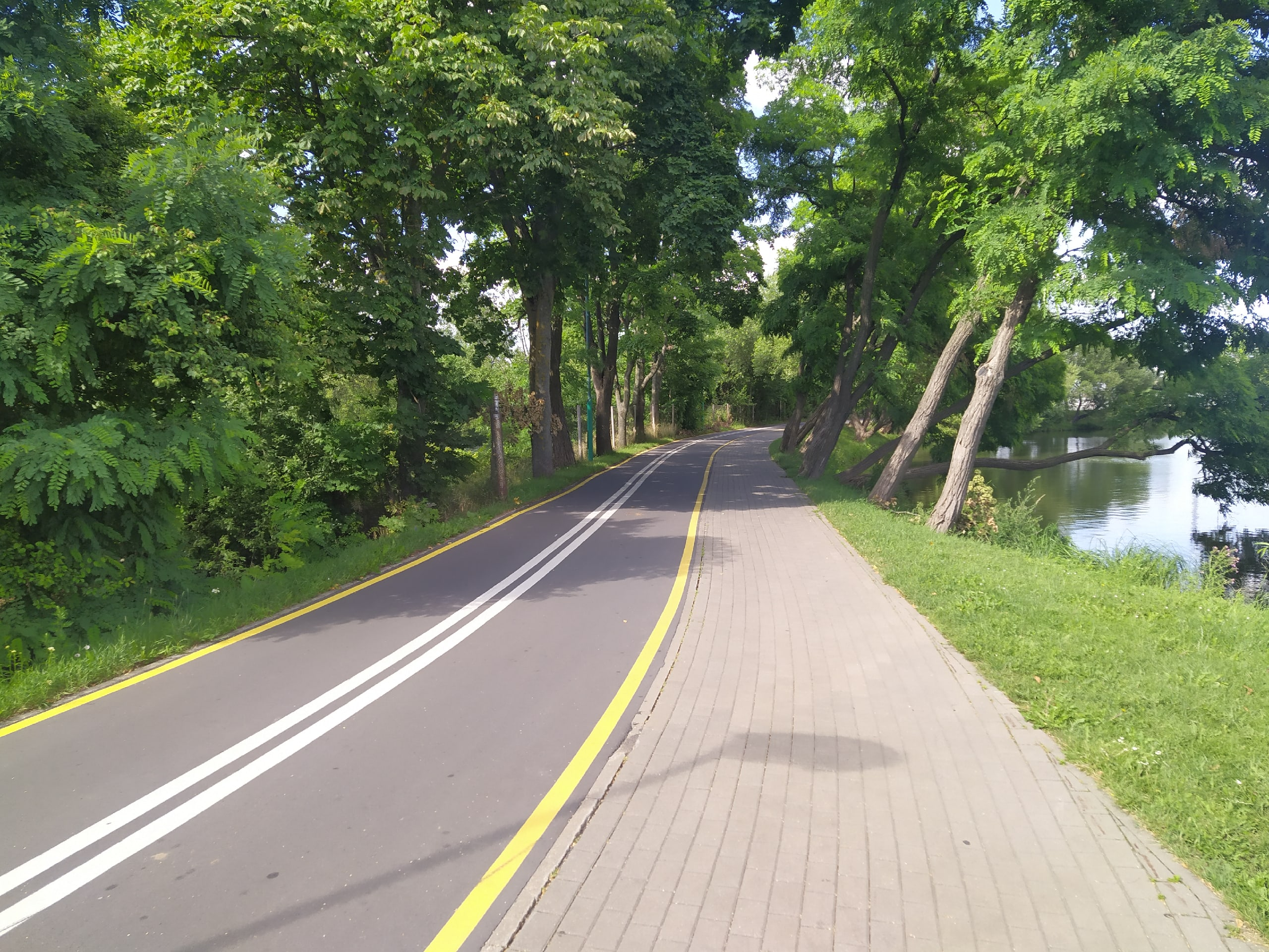 Во многом отгорожена от автомоблей.